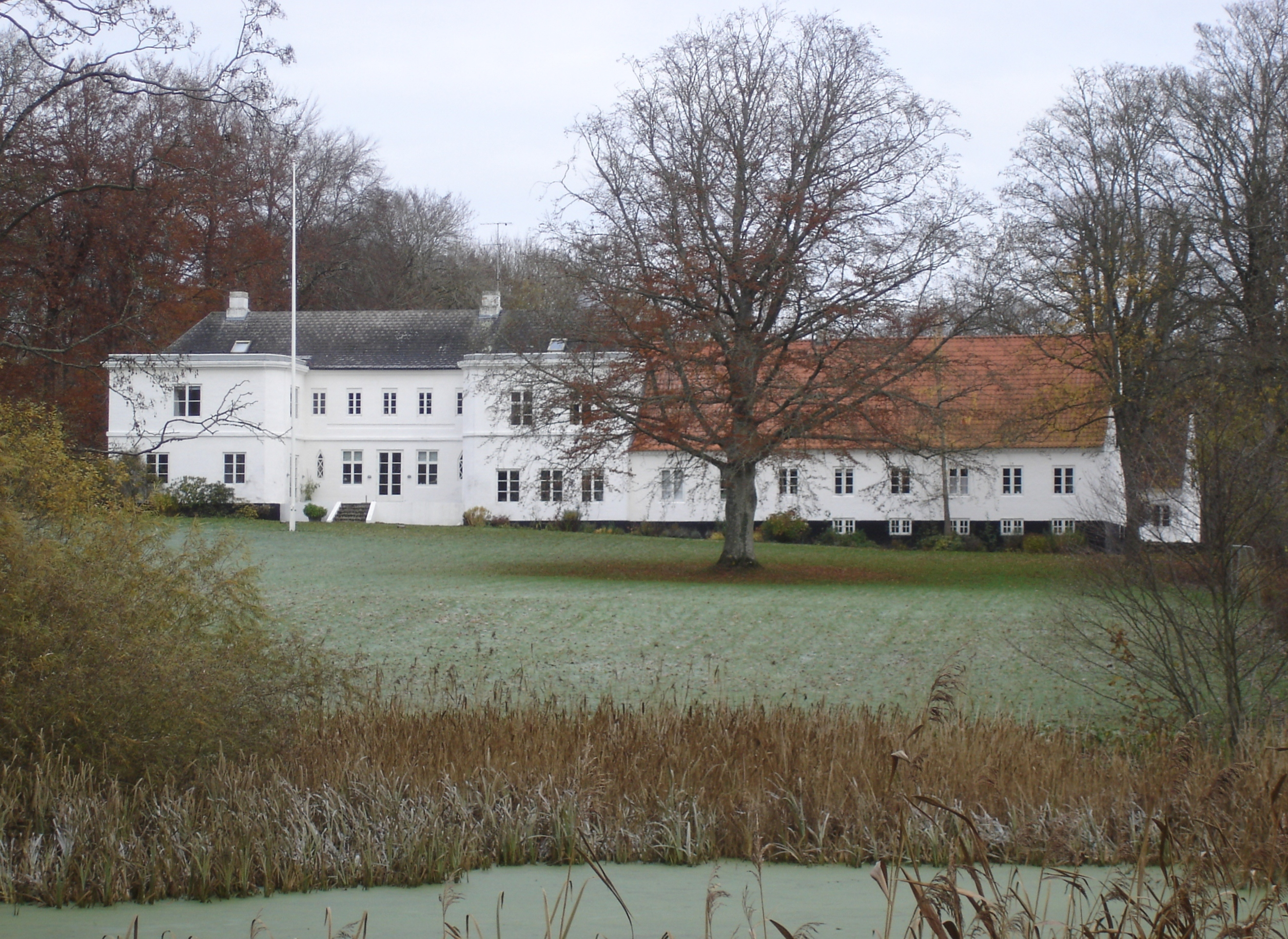 Herregården Randrup i Skibsted Sogn